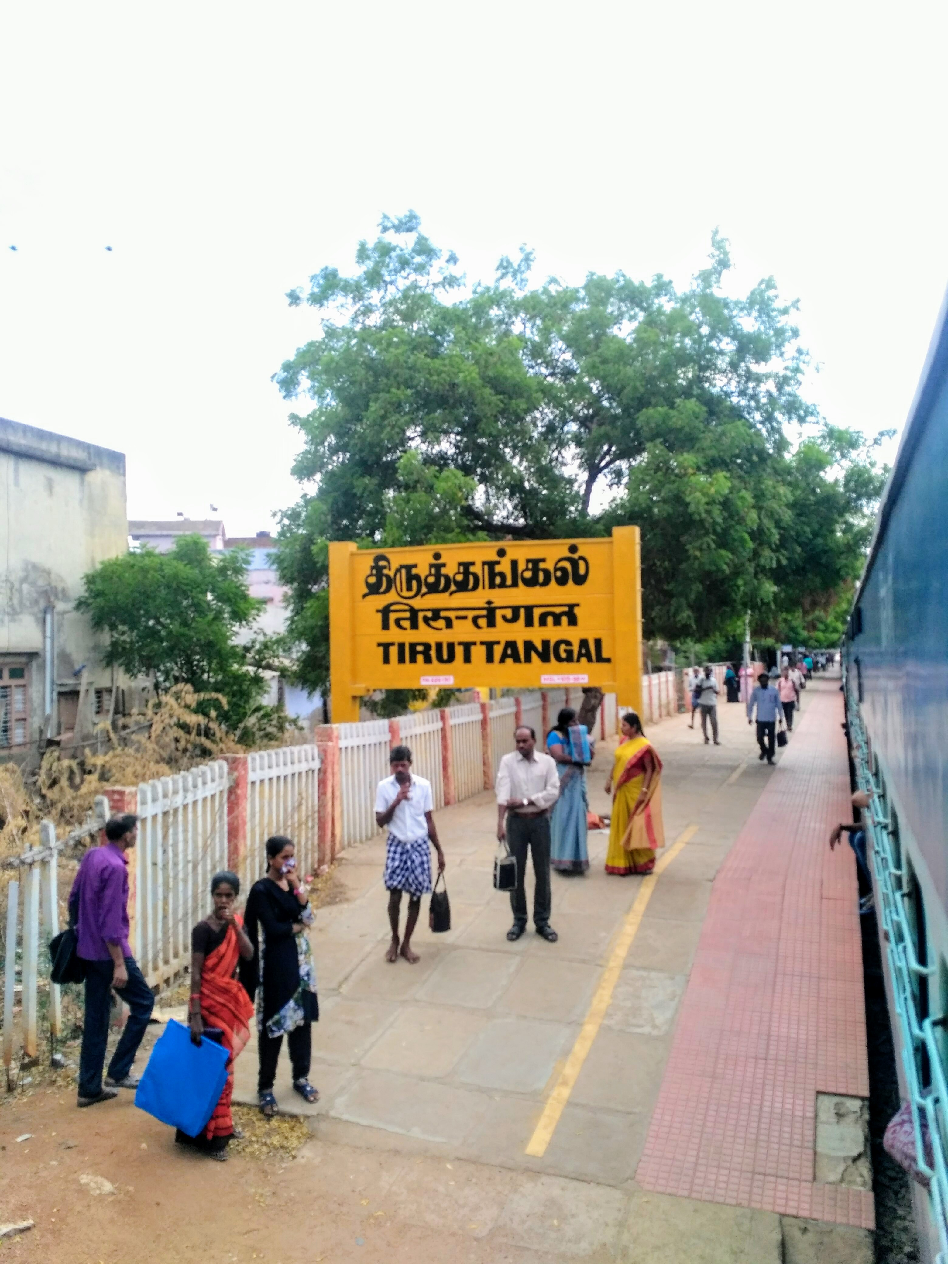 திருத்தங்கல் தொடருந்து நிலையம் ...